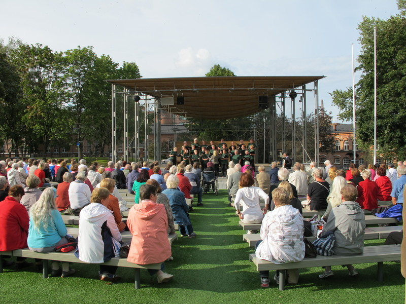 Laikunlava kesällä 2012